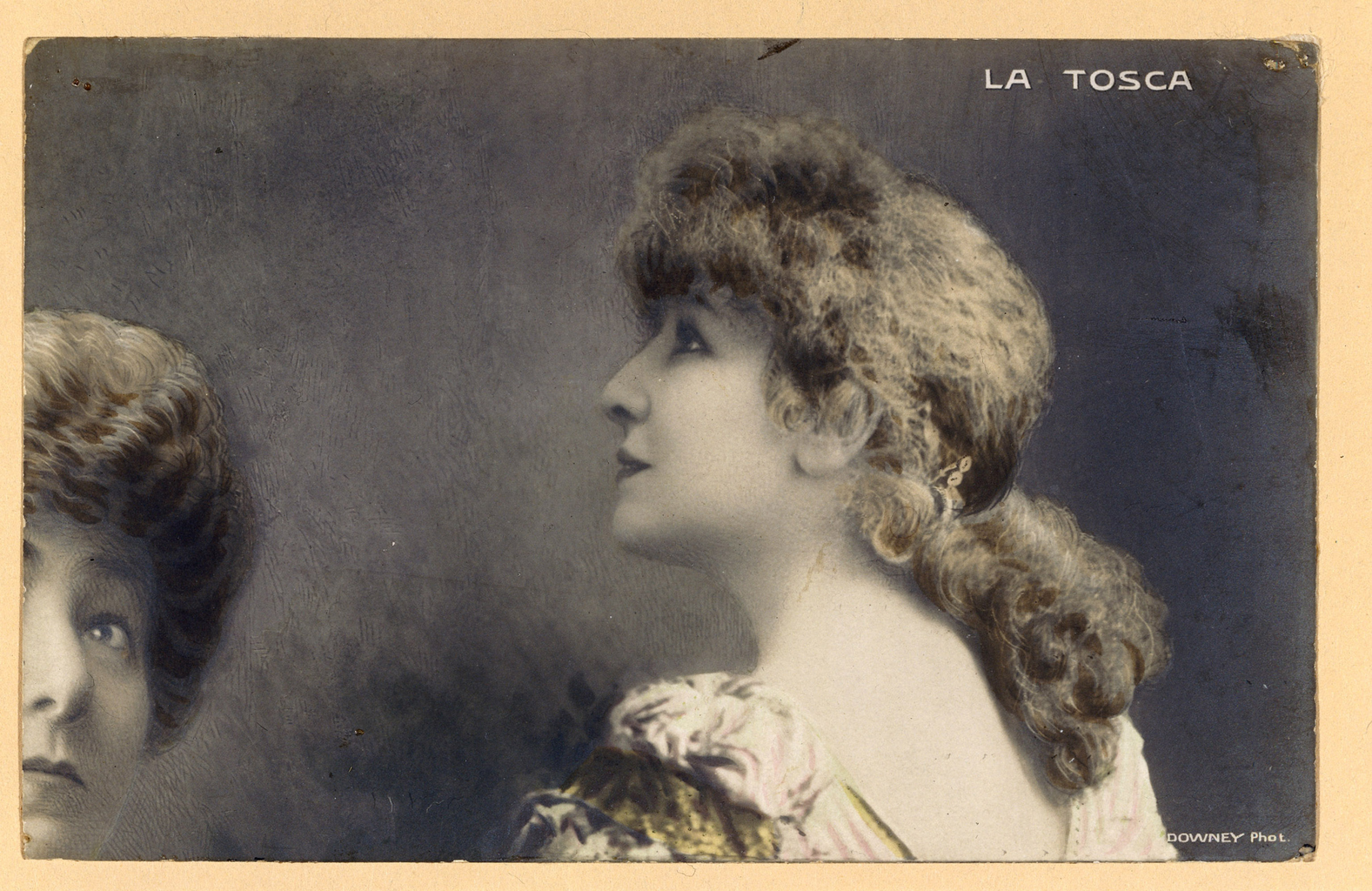 Postcard